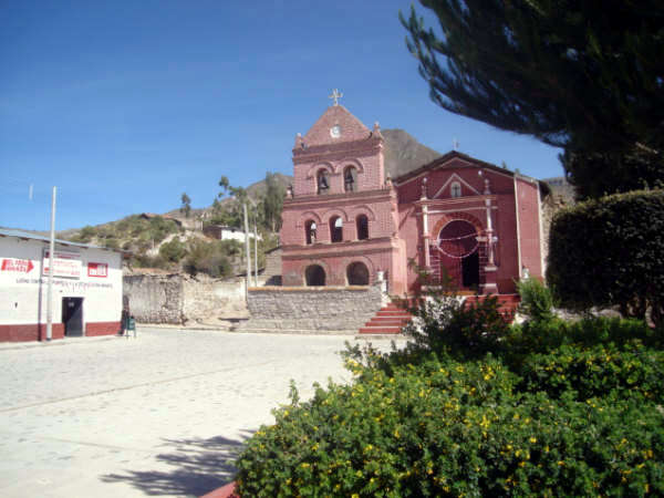 Iglesia de Sondondo (Ayacucho, Perú).